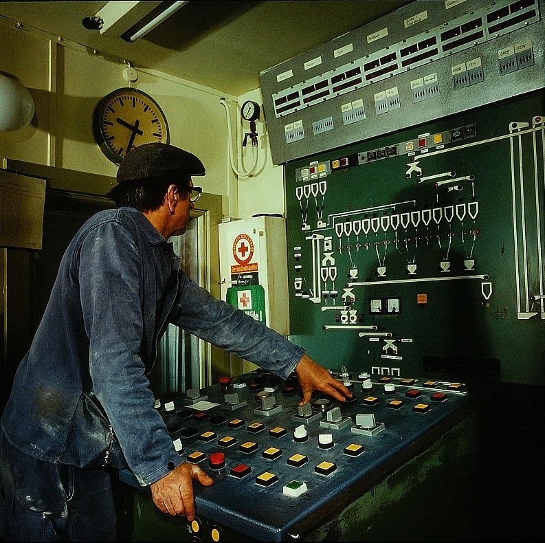 Original image description from the Deutsche FotothekFacharbeiter für Glastechnik